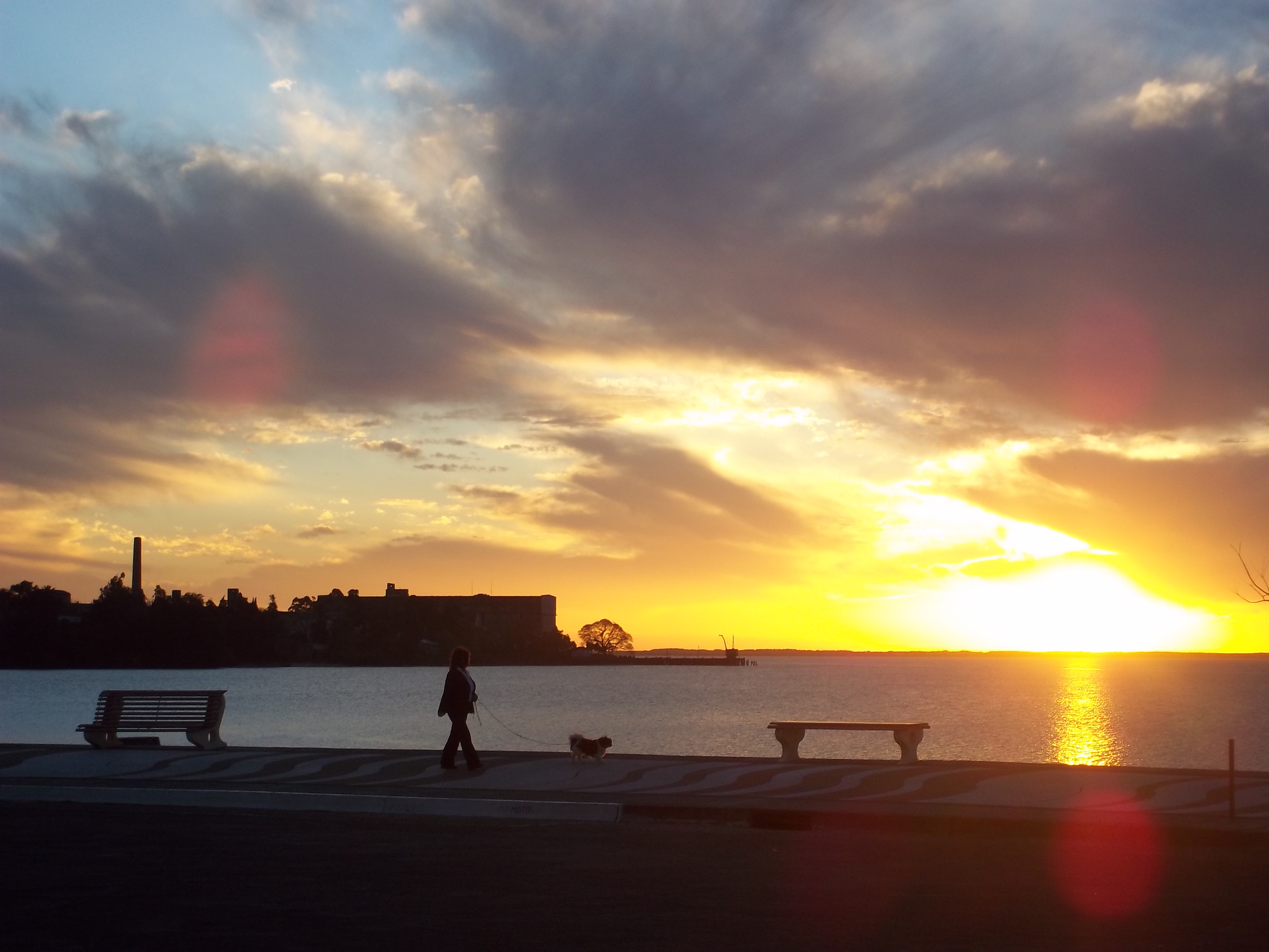 Frigorífico Liebigs y Barrio Obrero Anglo. La totalidad de edificaciones y equipamiento: mobiliario y máquinas, que pertenecieron a la antigua planta industrial del ex - frigorífico Liebigs y el barrio obrero conocido como Barrio Anglo. Ubicada en el departamento de Río Negro